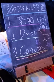 amiinaセトリボード(20150329(1))